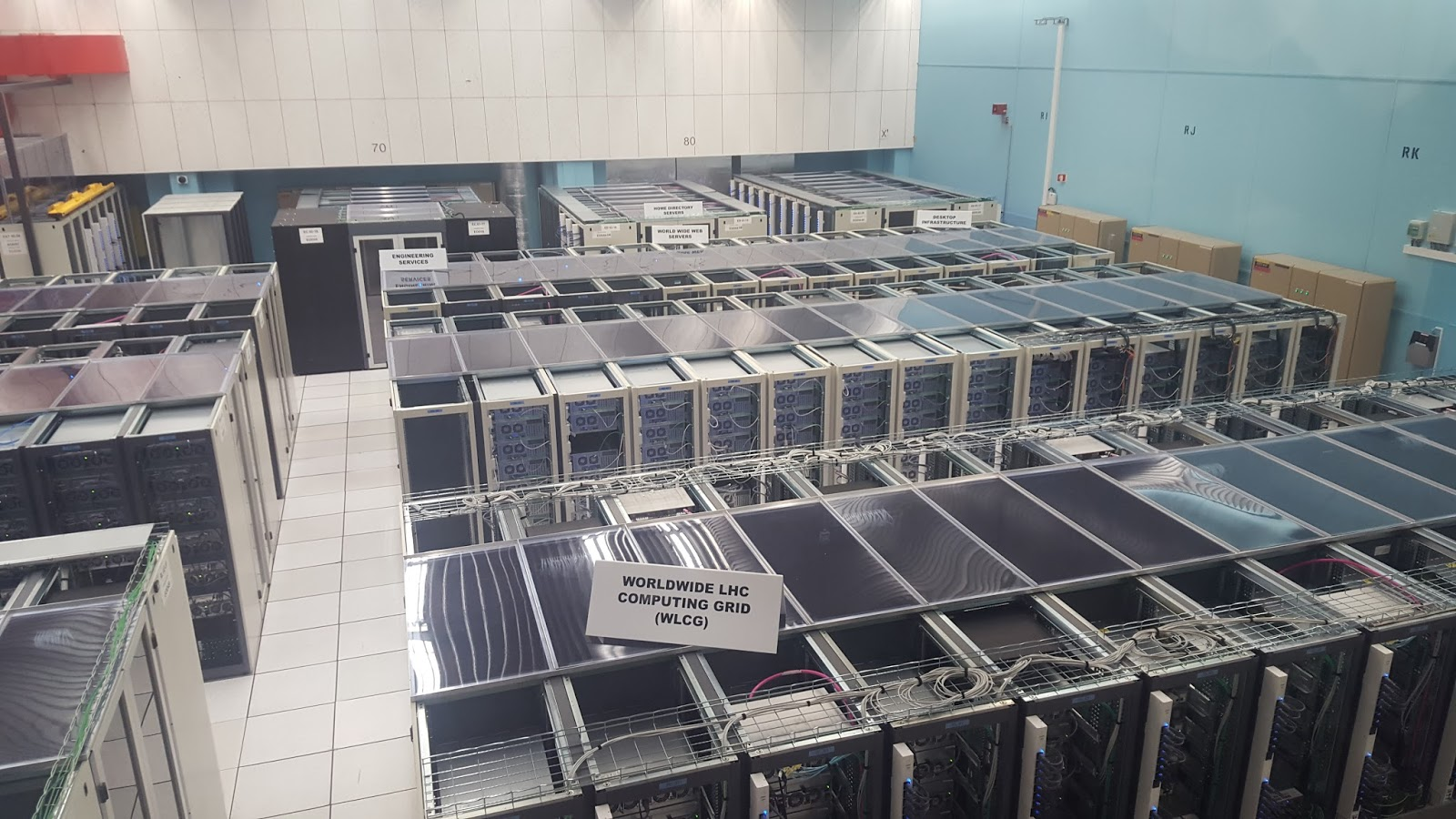 המחשבים שמעבדים את המידע בLHC